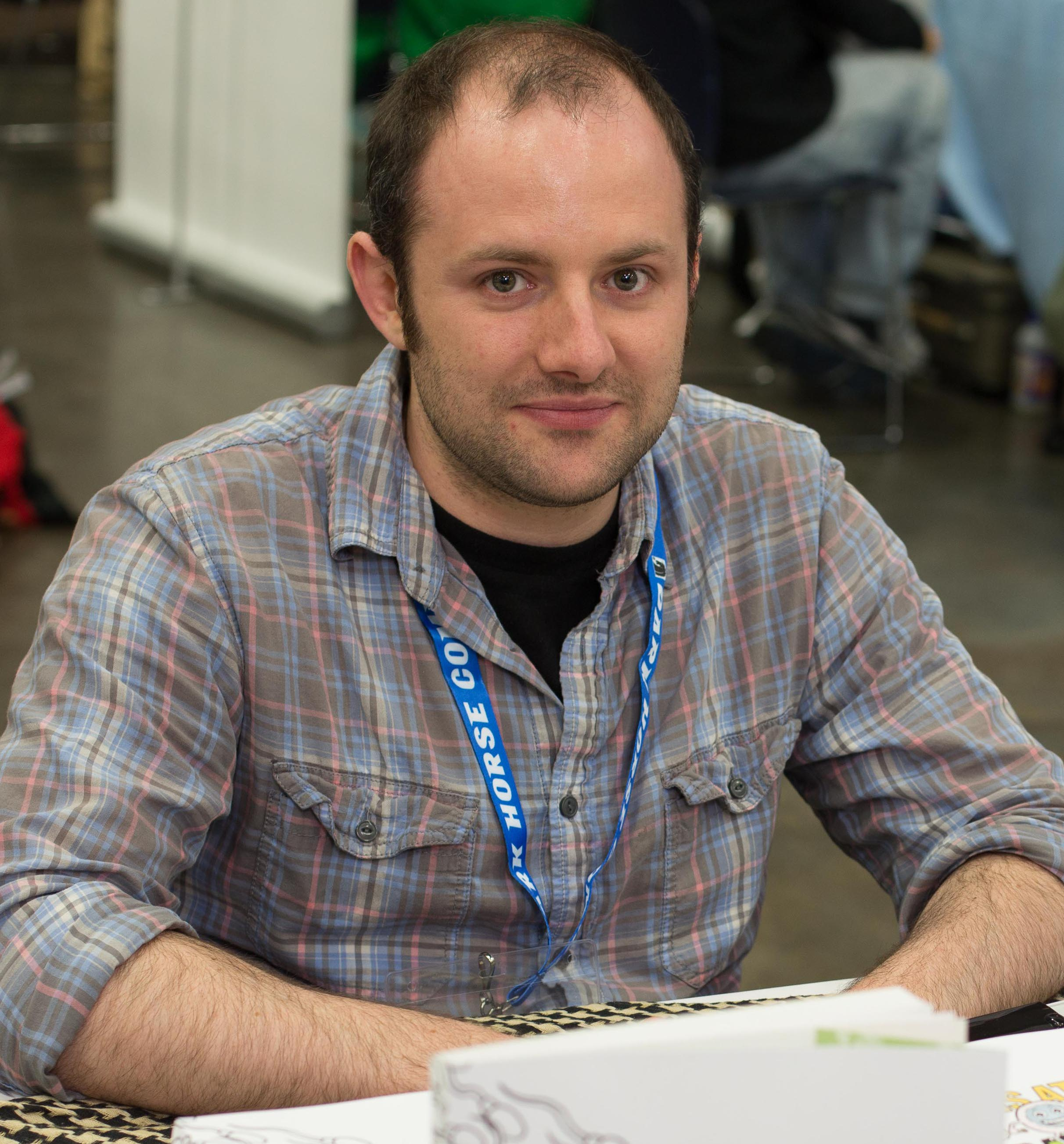 Matt Bors